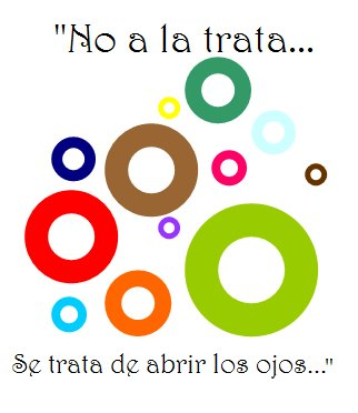 Afiche creado por estudiantes del colegio Santisimo Redentor en el año 2011 en contra de la trata de personas.